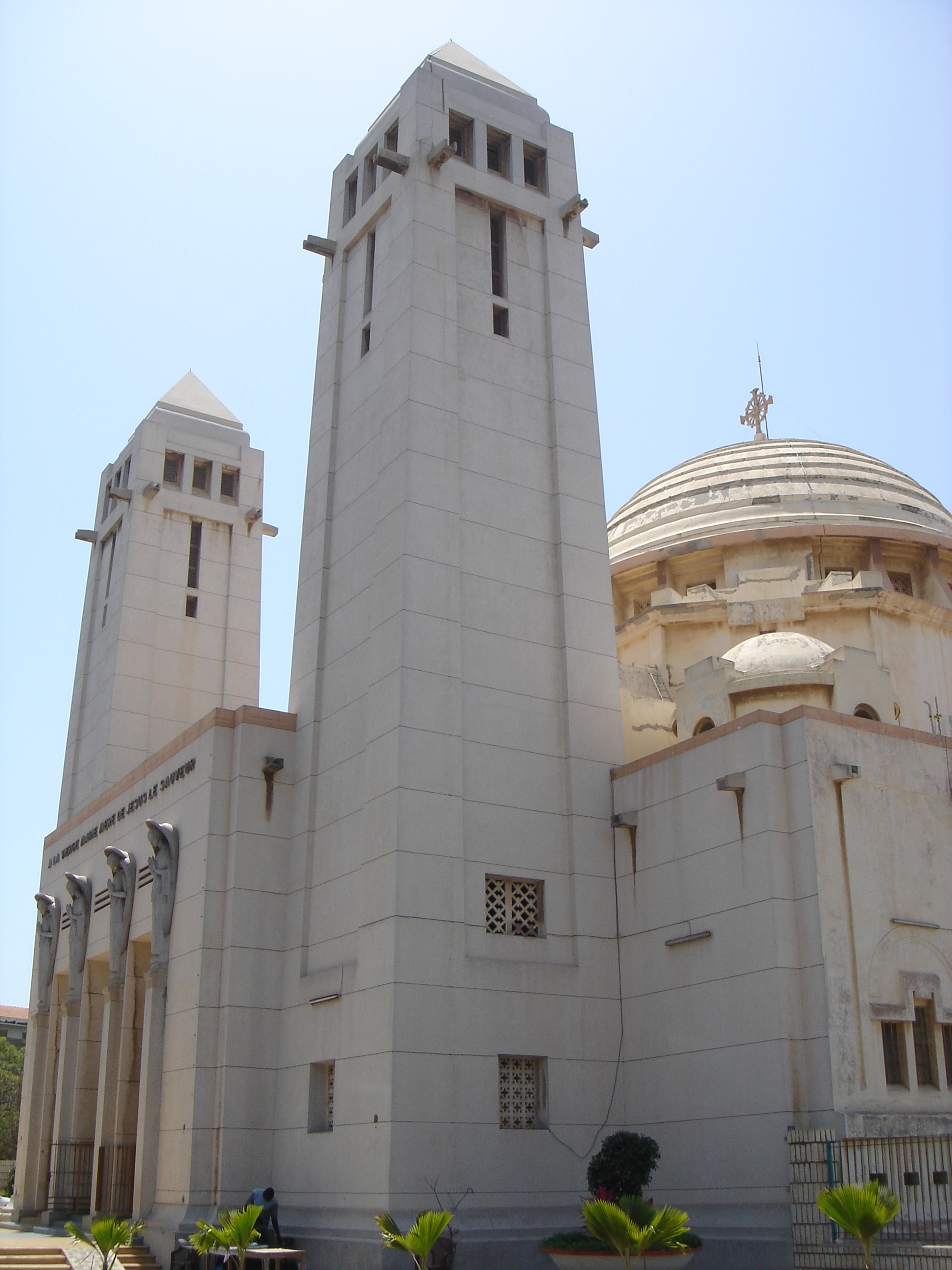 La cathédrale de Dakar, boulevard de la république. Photo de Vincent Ricci, avril 2005.